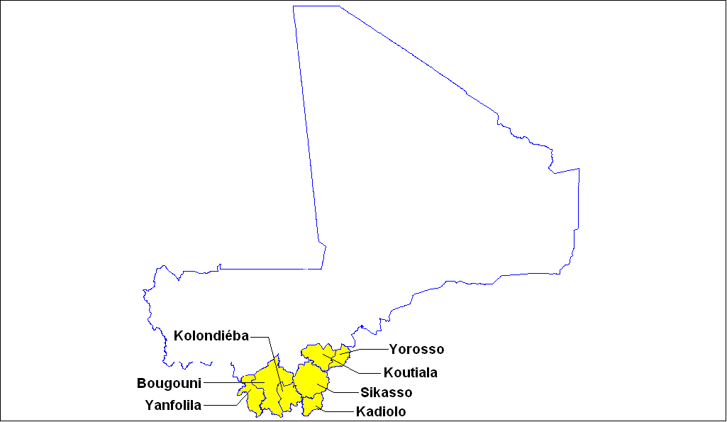 Les cercles de la région de Sikasso au Mali. Créée par Olivier Epron à partir de l'Image:Mali cercles.png